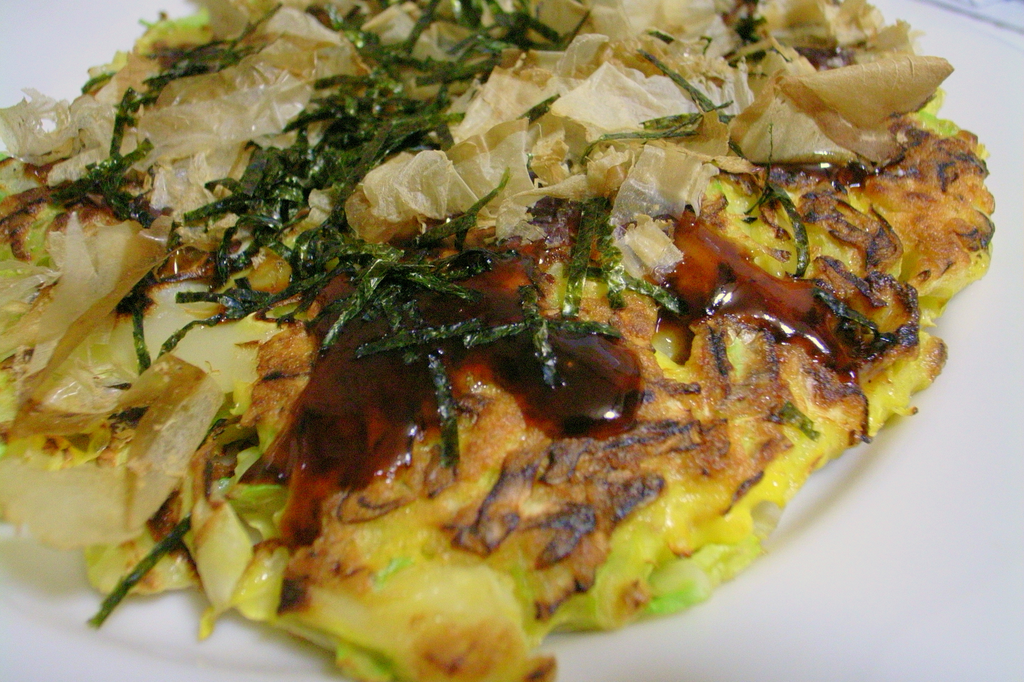 Okonomiyaki.